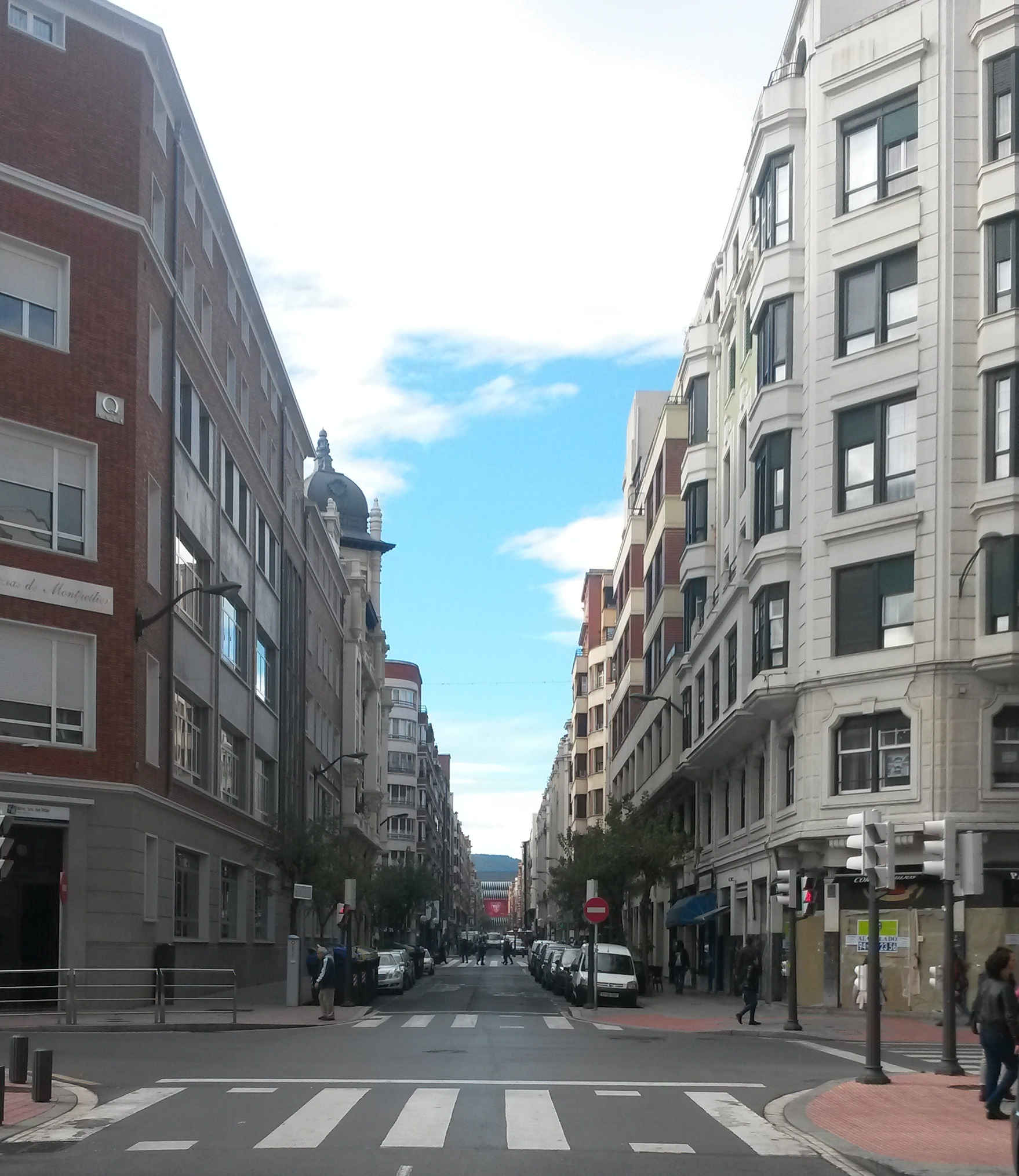 Calle Licenciado Poza a la altura de la Plaza Bizkaia. Al final de la misma el nuevo Estadio de San Mamés.